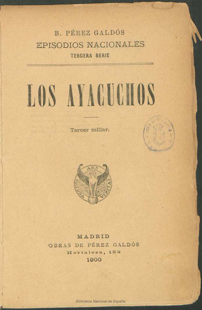 Los Ayacuchos, B. Pérez Galdós Autor: Pérez Galdós, Benito (1843-1920) Fecha: 1900 Datos de edición; Madrid, Obras de Pérez Galdós